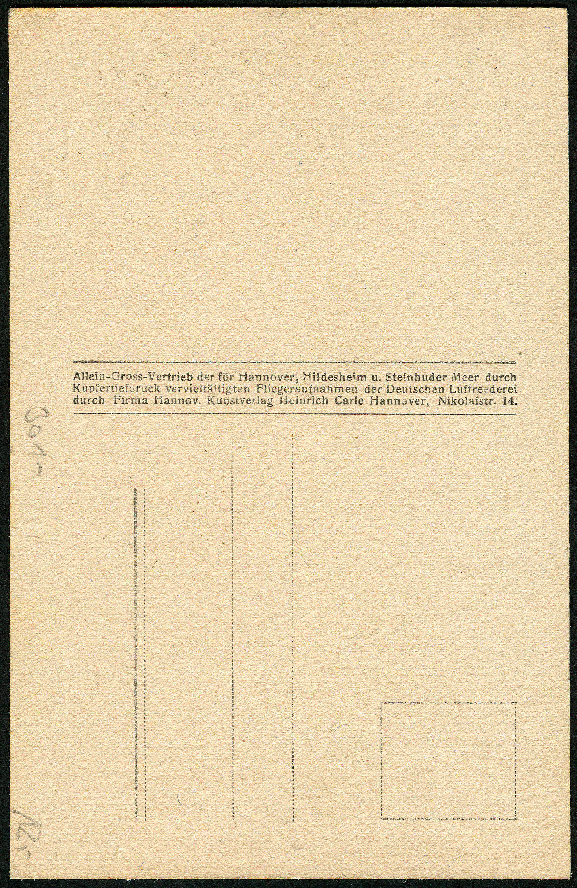 Vorgedruckter Text auf der Adressseite der Ansichtskarte mit der "Fliegeraufnahme" unter der fortlaufenden Nummer 1848 : „Allein-Gross-Vertrieb der für Hannover, Hildesheim u. Steinhuder Meer durch Kupfertiefdruck vervielfältigten Fliegeraufnahmen der Deutschen Luft-Reederei durch Firma Hannov. Kunstverlag Heinrich Carle Hannover, Nikolaistraße 14.“ ...